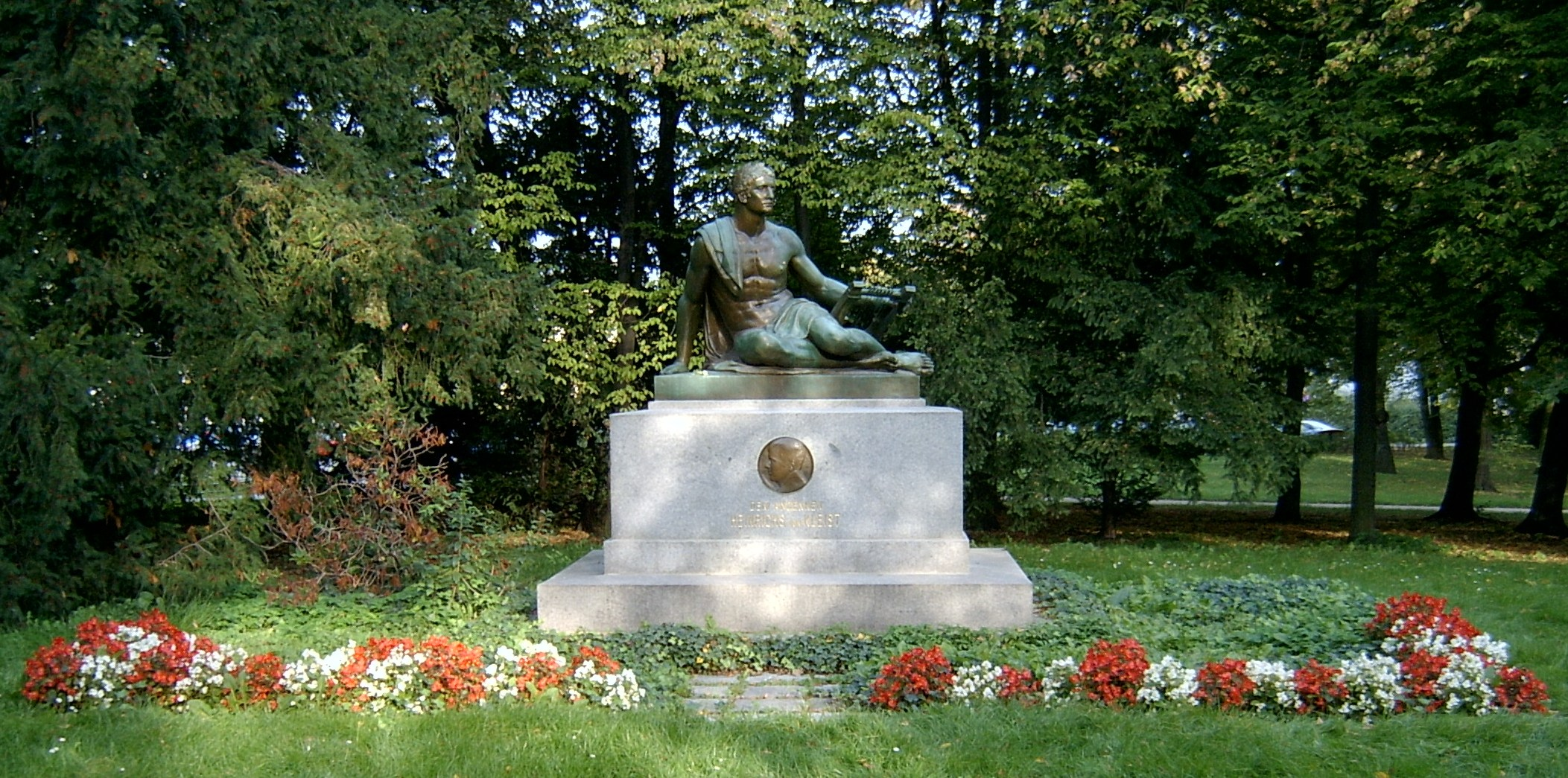 Denkmal Heinrich von Kleists in Frankfurt (Oder). Das Denkmal steht im Park nördlich der Gertraudenkirche. Errichtet wurde es 1910. Mehr Informationen siehe Denkmäler in Frankfurt (Oder)